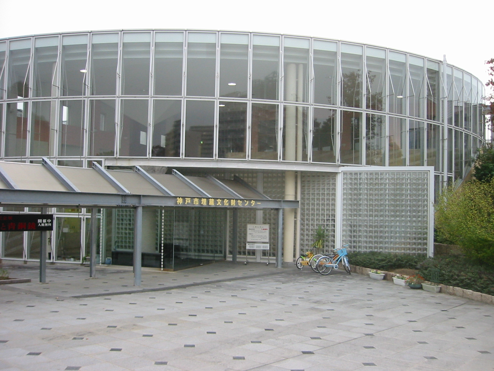 神戸市埋蔵文化財センター(神戸市西区糀台(こうじだい)6丁目 西神中央公園内)